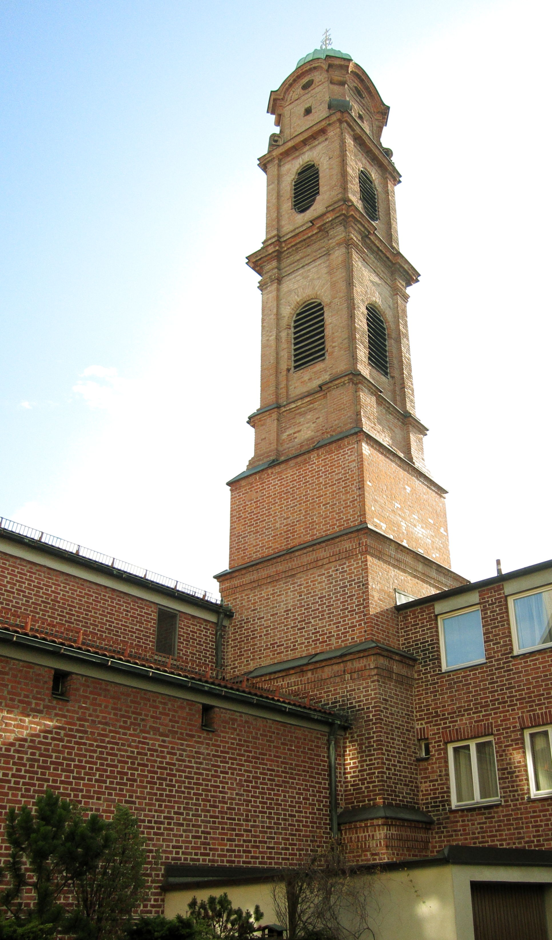 München, Herzogspitalstraße 7; Turm der Kath. Herzogspitalkirche, nach Kriegszerstörung der Kirche moderner Neubau, vom alten Bau ist nur der im Hof stehende barocke Turm erhalten, 1727 von Johann Baptist Gunezrainer.